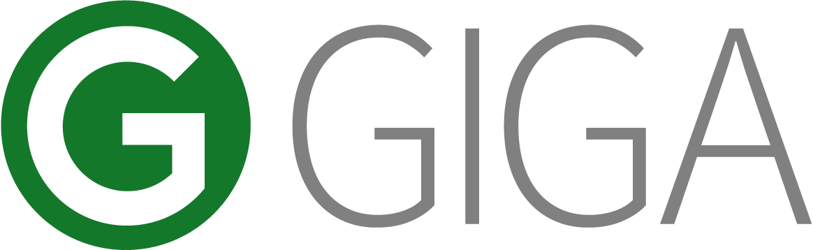 giga.de Logo 2013